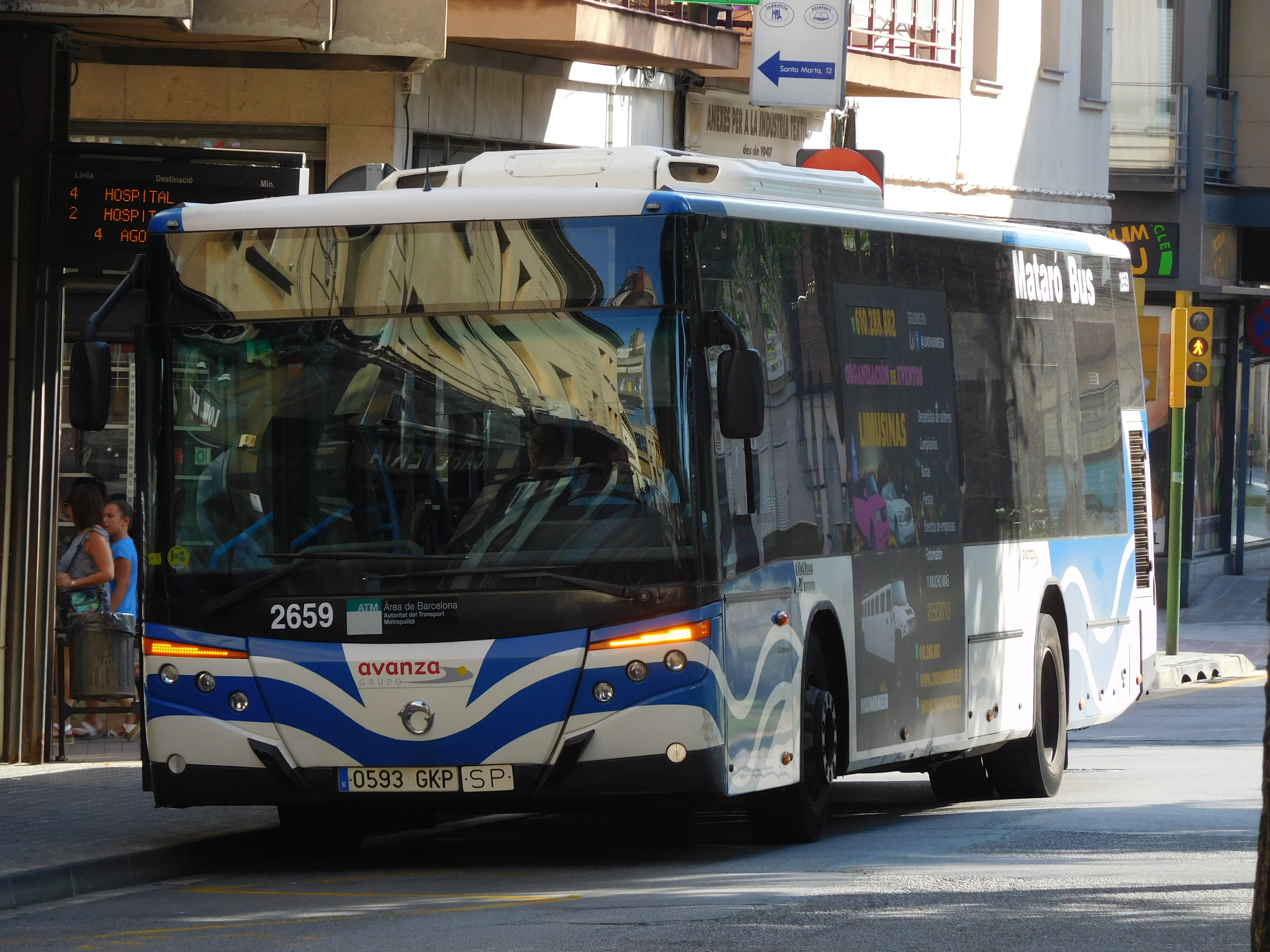 August 2017.